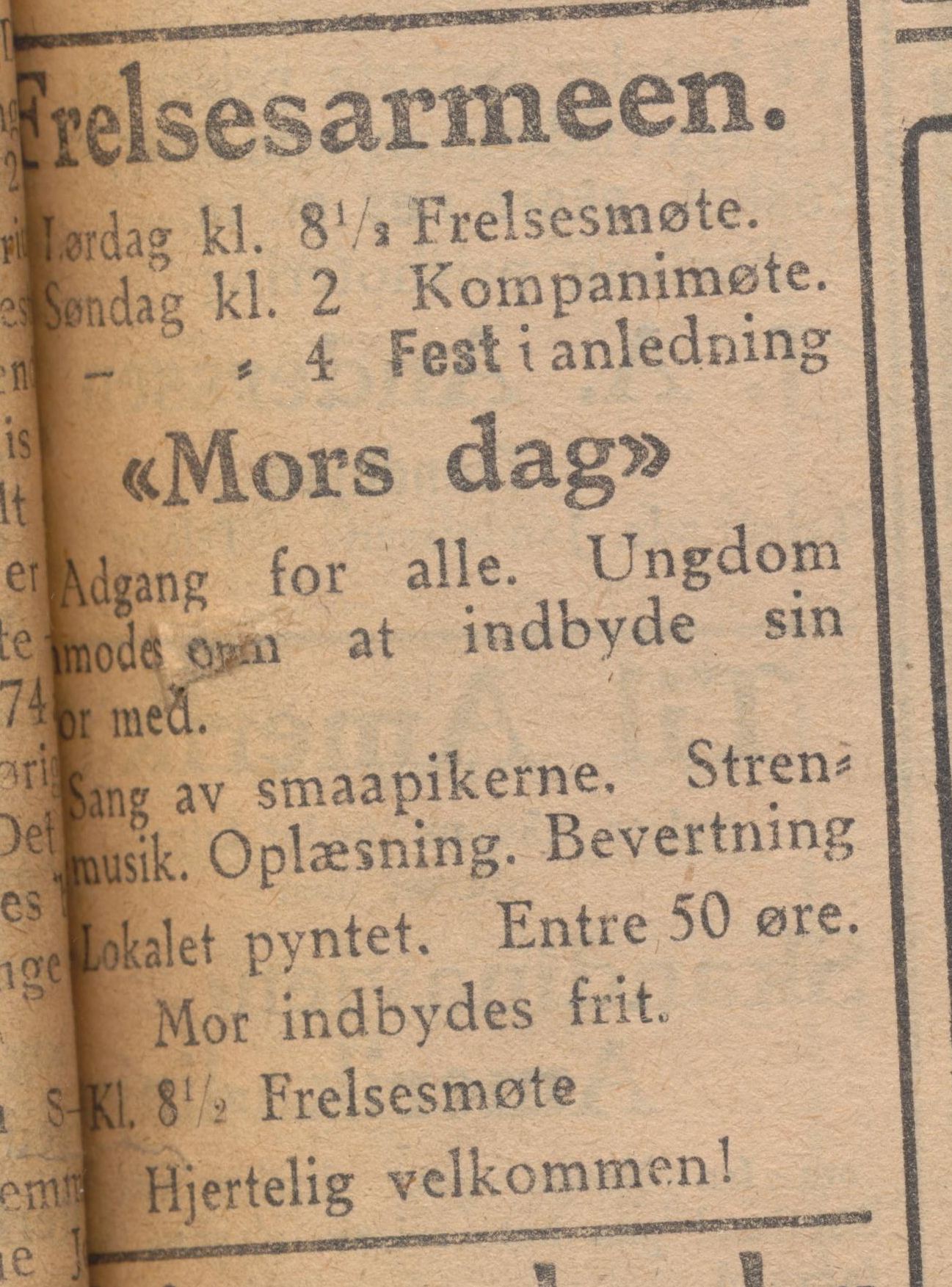 Annonse i Helgelands Tidende, Mosjøen 7. februar 1919